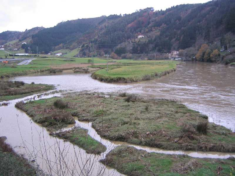 Marismas del río Aribai en Ondarroa, Vizcaya, País Vaco, España.